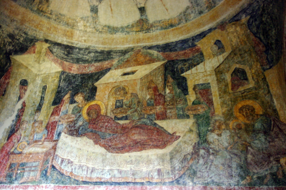 Detail Fresco in Kirche Agia Sophia, Oberstadt